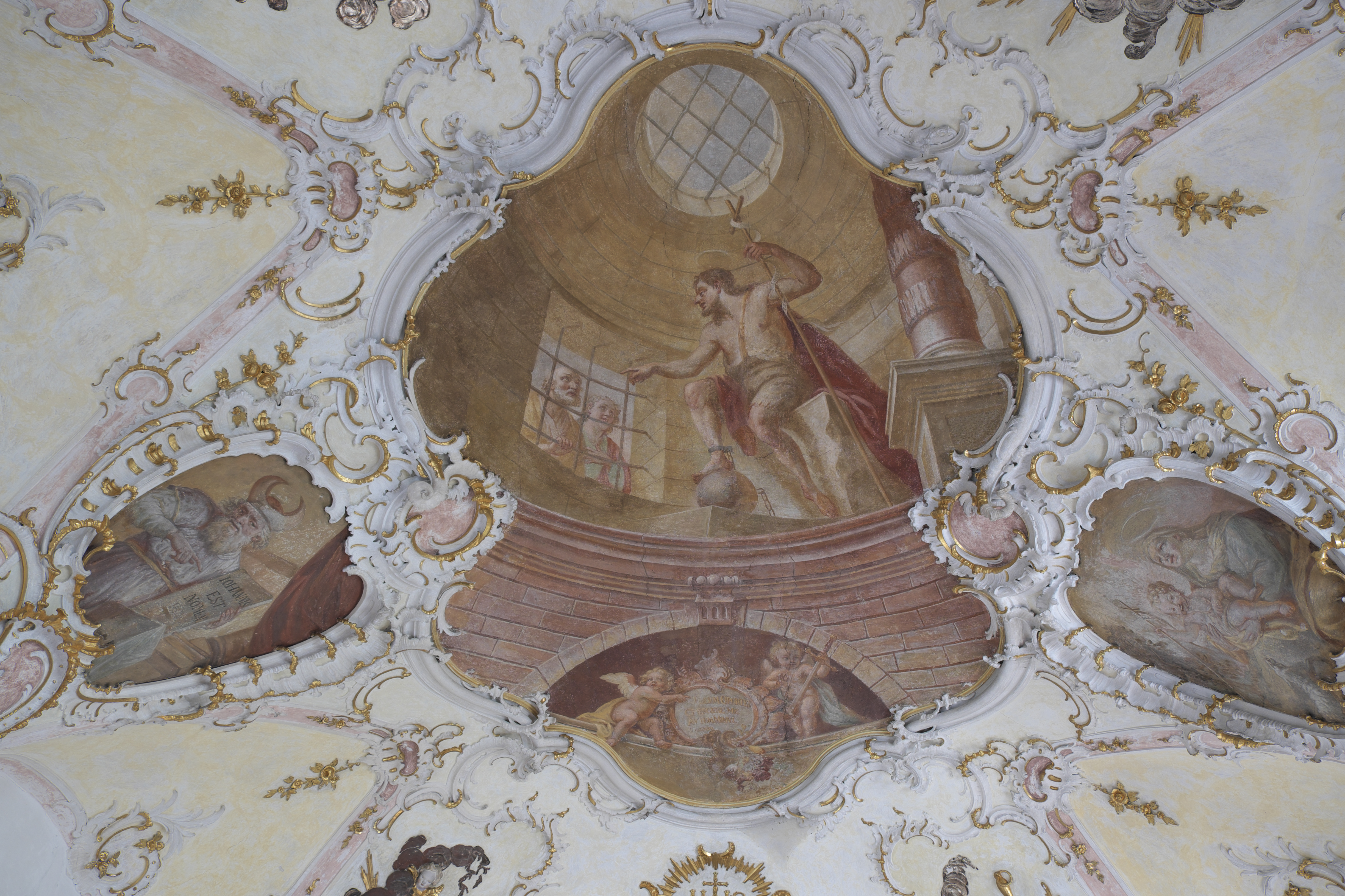 Katholische Pfarrkirche St. Johannes der Täufer in Rott im Landkreis Landsberg am Lech (Bayern/Deutschland), Fresken im Chor von Johann Baptist Baader, von 1779; Darstellung: Johannes der Täufer im Kerker